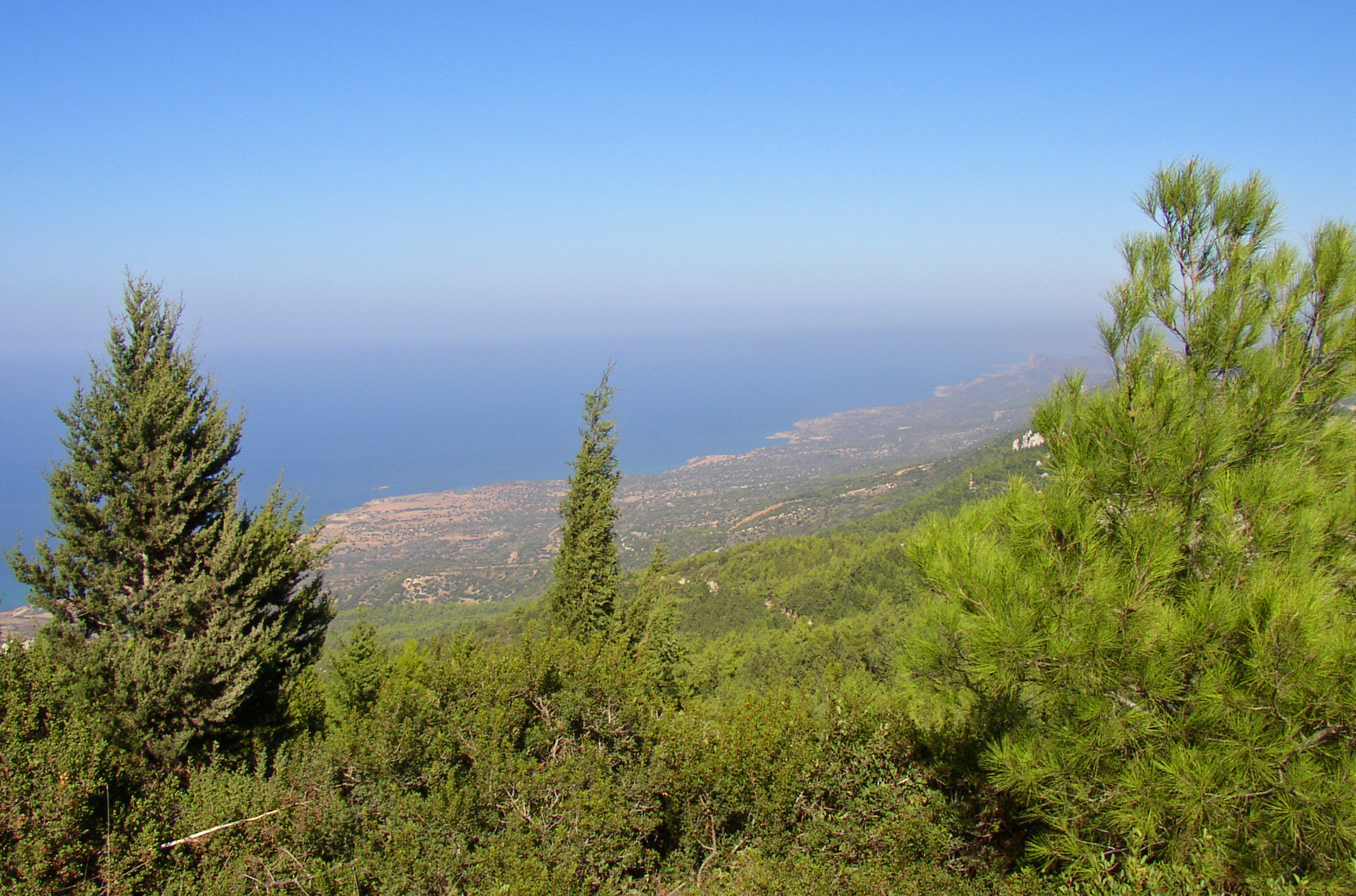 Blick Richtung Türkei von der Kantara Burg in Nord Cypern (2003)